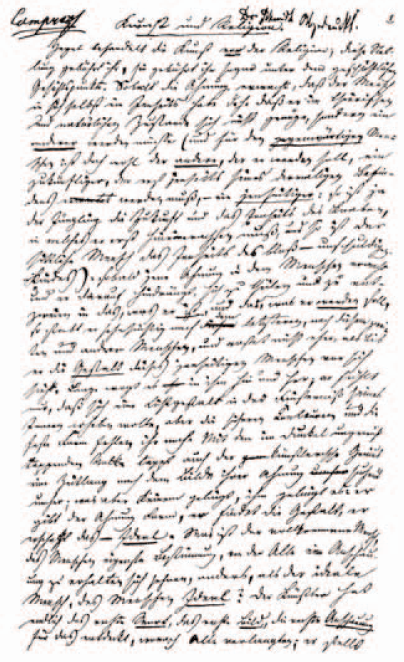 Página del manuscrito original de Max Stirner "Kunst und Religion", publicado en junio de 1842.